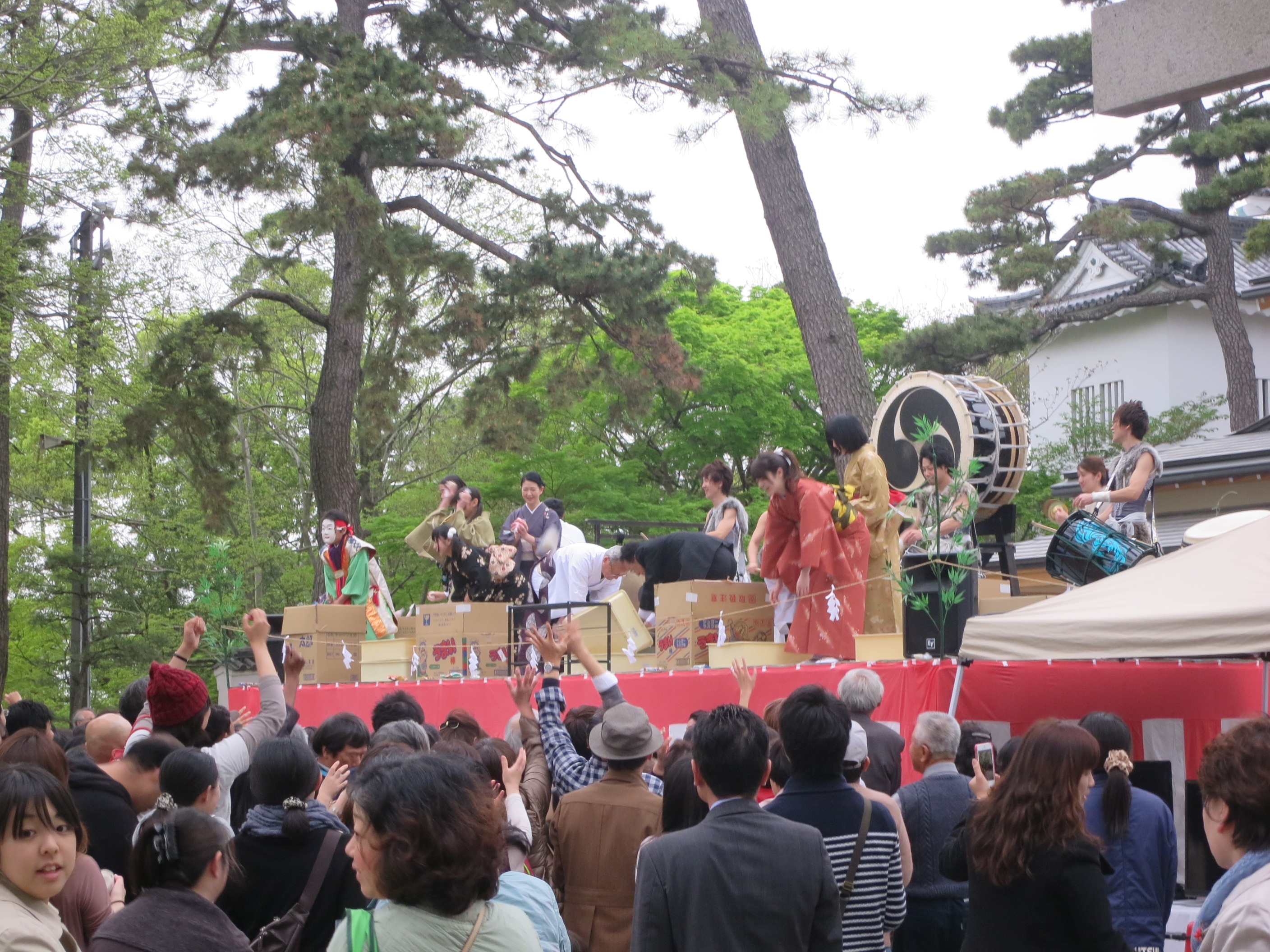 徳川家康公四百年式年大祭。岡崎市、龍城神社にて。